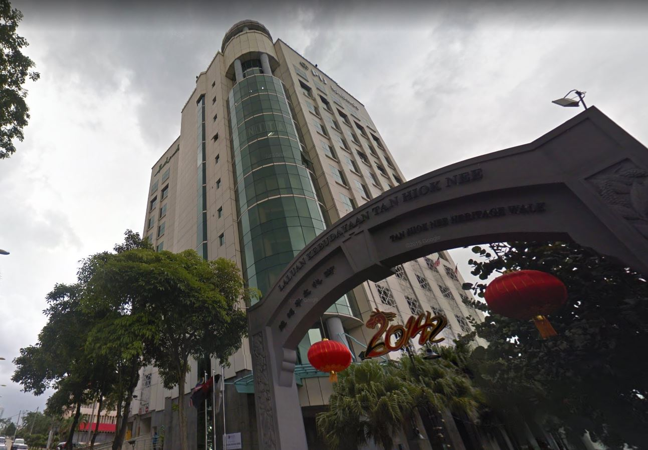 Bangunan PIJ Holdings